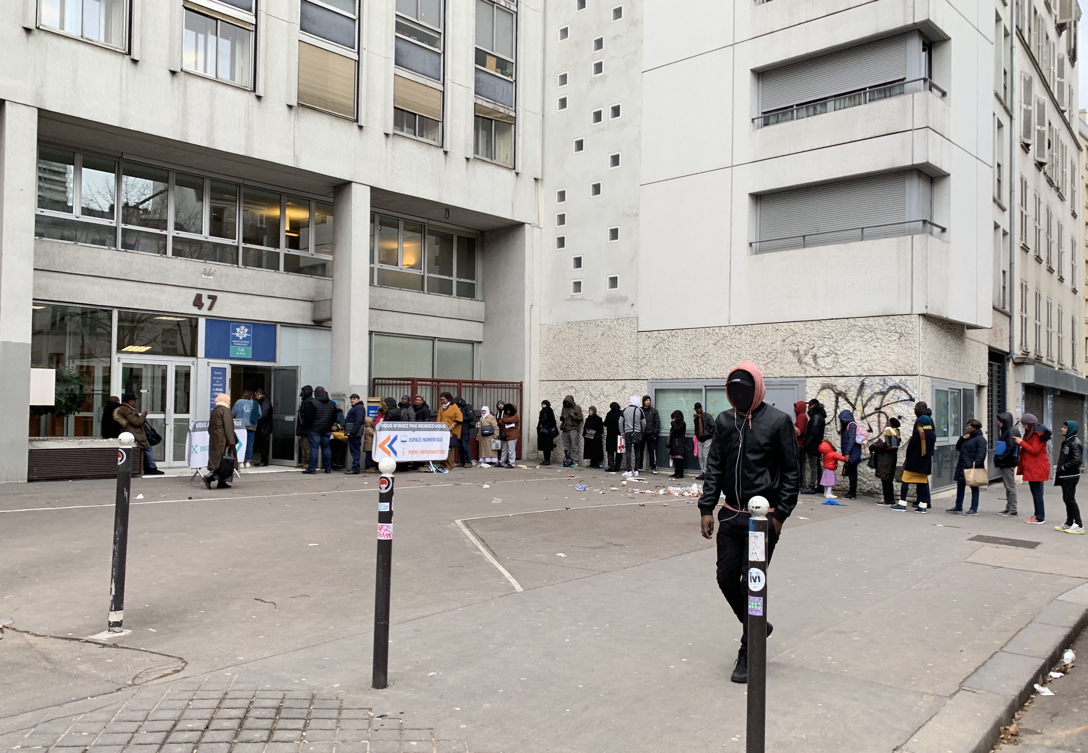 Caisse d'allocations familiales du 18e arrondissement de Paris (47, rue de la Chapelle)